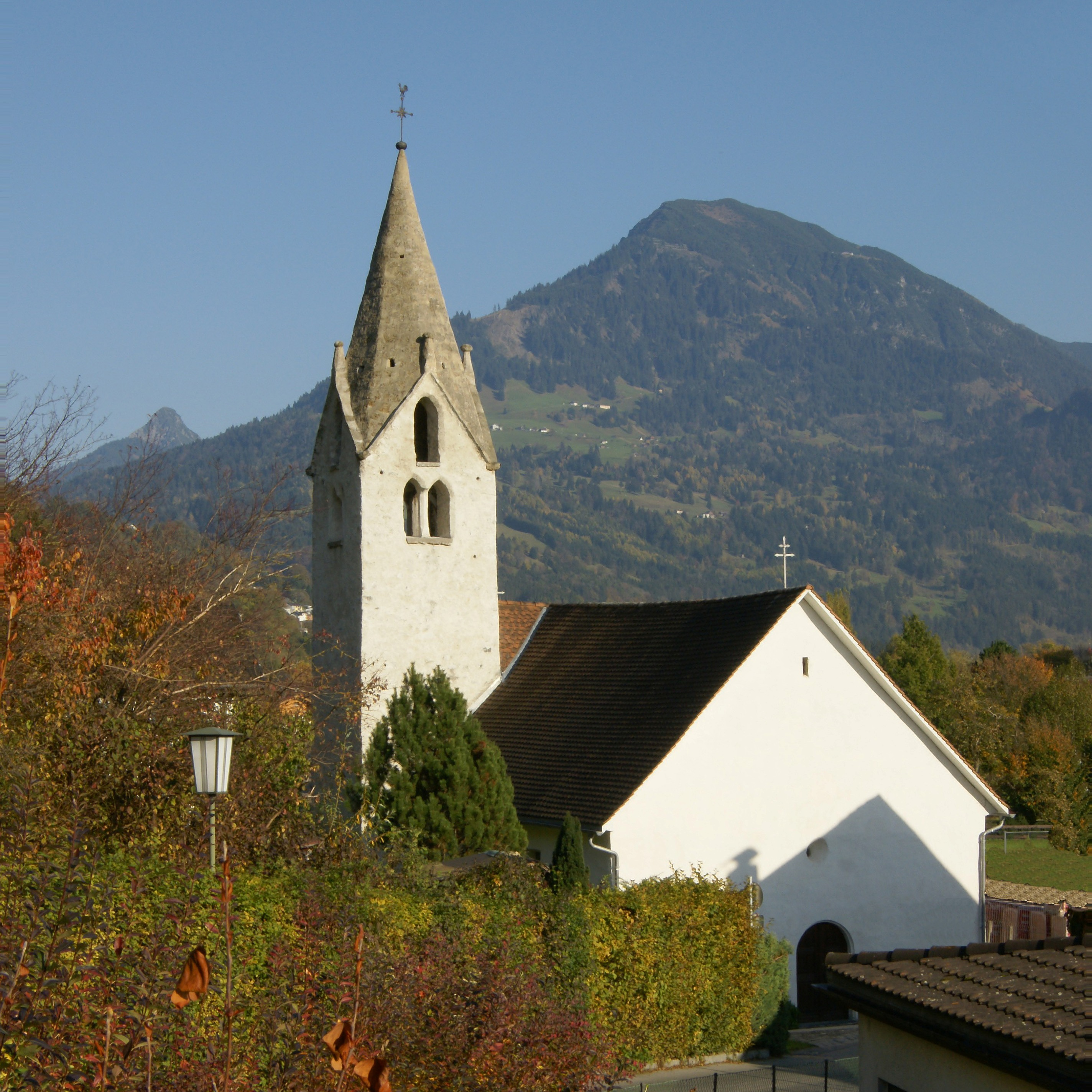 Bludesch, Filialkirche hl. Nikolaus, in Zitz. Urkundlich um 842 "Cise". 1483 Kaplanei. Breiter spätromanischer Bau mit eingezogenem quadratisch barockem Chor unter gemeinsamen Satteldach, Rechteckfenster; Nord-Tur, mit gekoppelten un einfach darüber gestellten Schallöffnungen, vorkragendem Giebelgesims, gemauertem Giebelspitzhelm mit knopfartigen Fialen. Südlich an Langhaus und Chor angebaute Sakristei mit Pultdach von 1629. Im Chor ehemalige Rundapsis durch Ausgrabungen festgestellt, Ummantelung 1629/30.